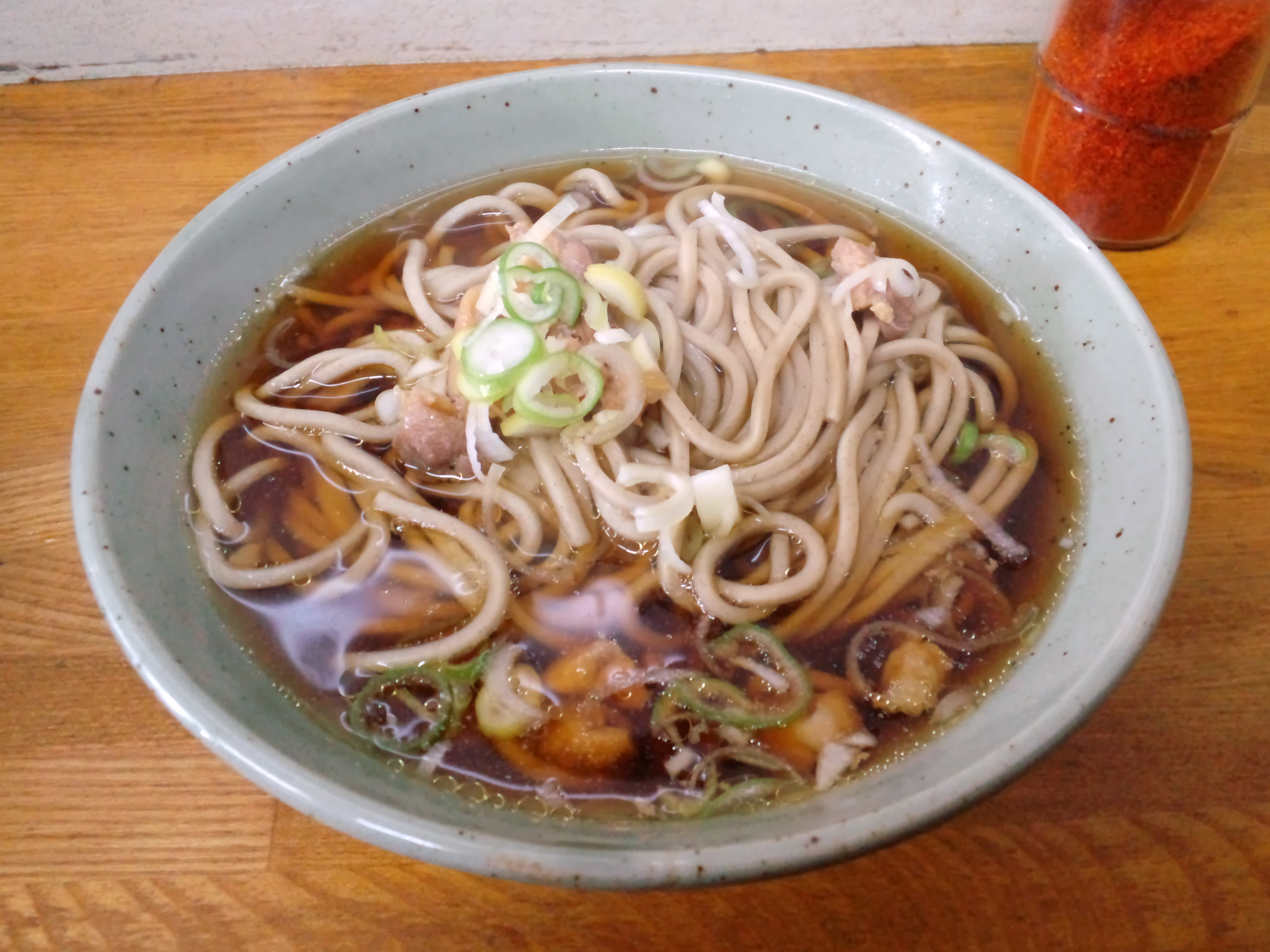 小もろそば店の肉そば